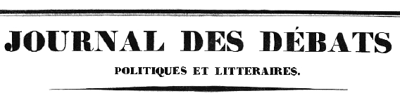 Page de titre du Journal des Débats (12 mars 1833)